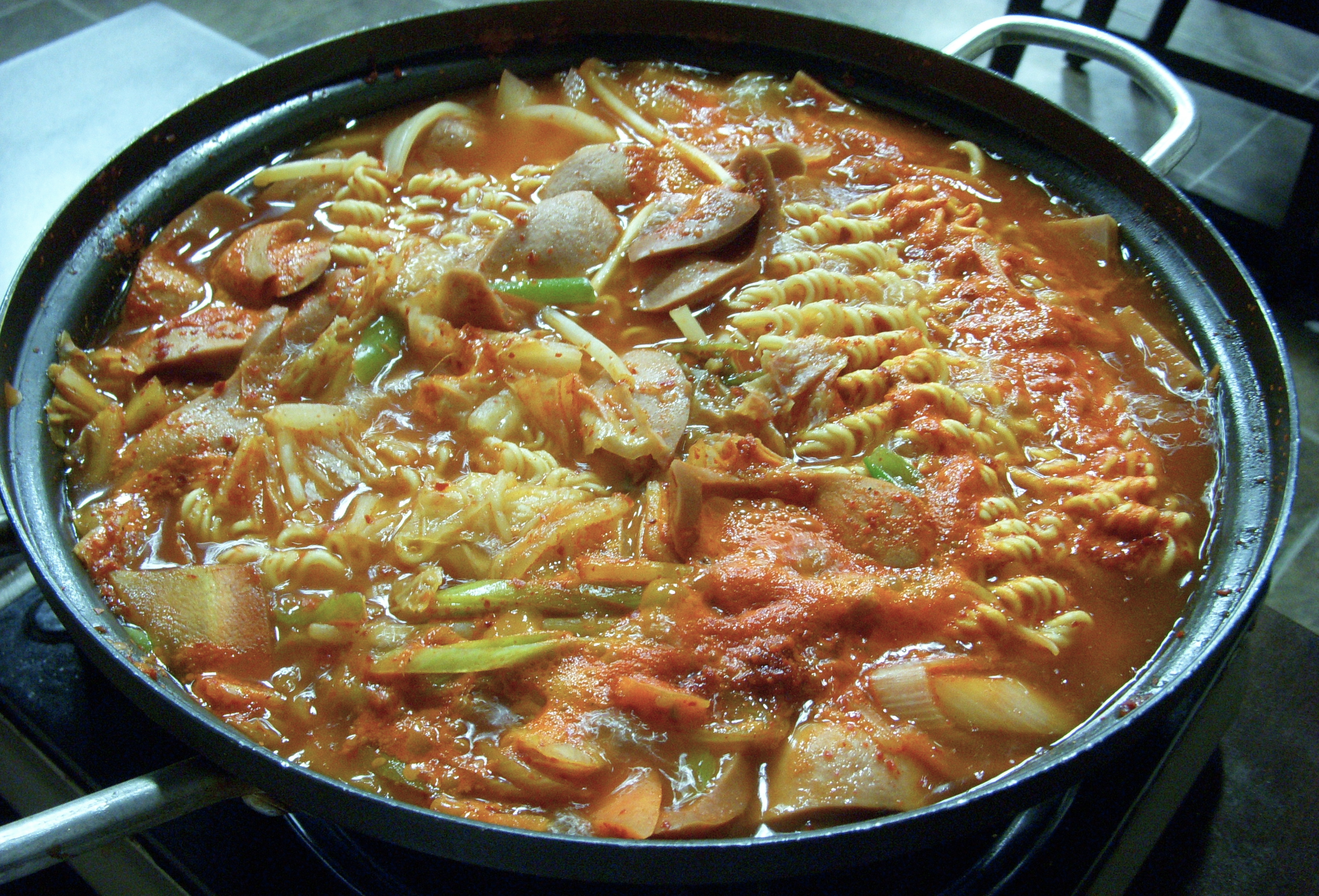 Budae jjigae in Korean cuisine